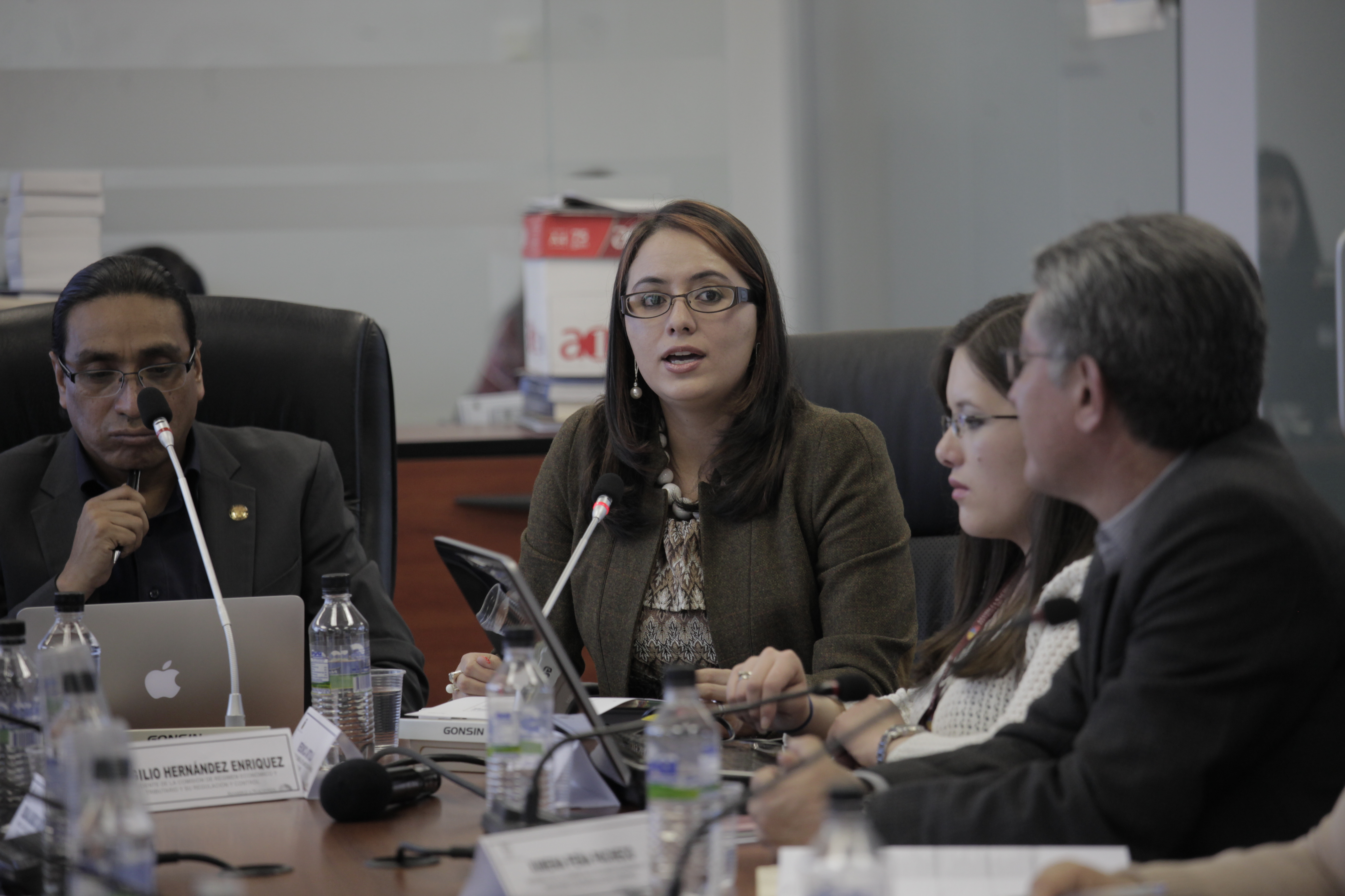 TEMA: Proforma presupuestaria 2016, programación cuatrianual y límite de endeudamiento. -Verónica Artola, Subsecretaria General de Planificación para el Buen Vivir (SENPLADES) Fotografía: Alberto Romo/Asamblea Nacional